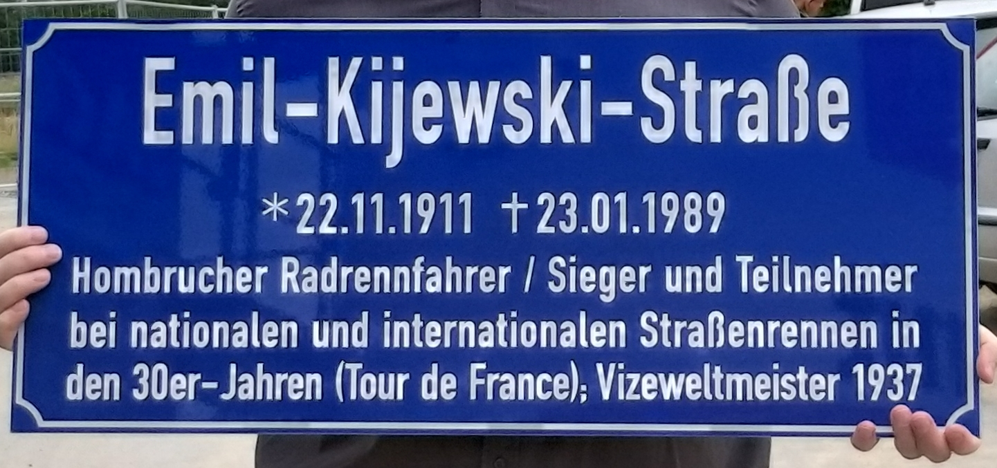 Legendenschild Emil Kijewski - Dortmund Lücklemberg